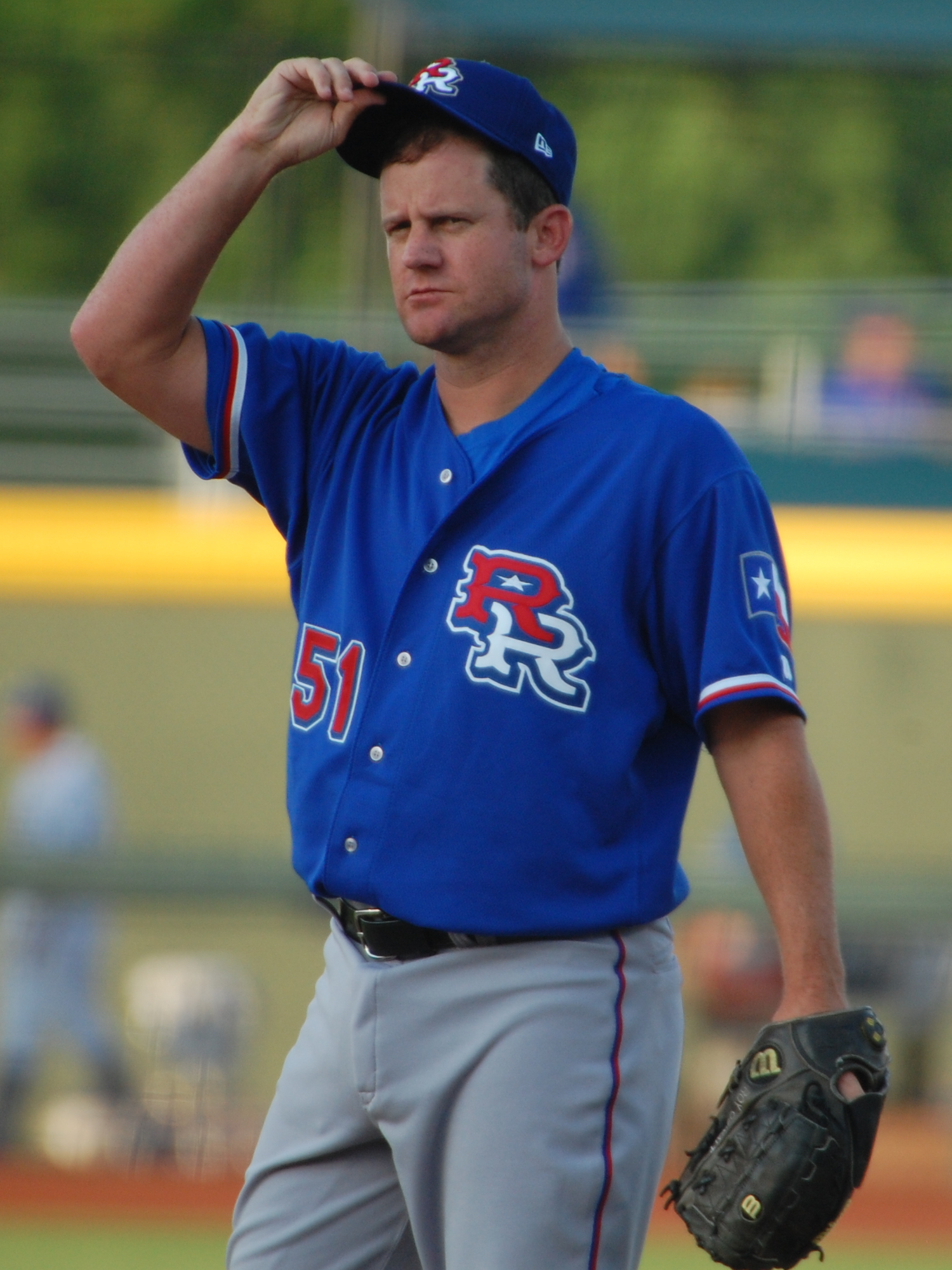 Roy Oswalt